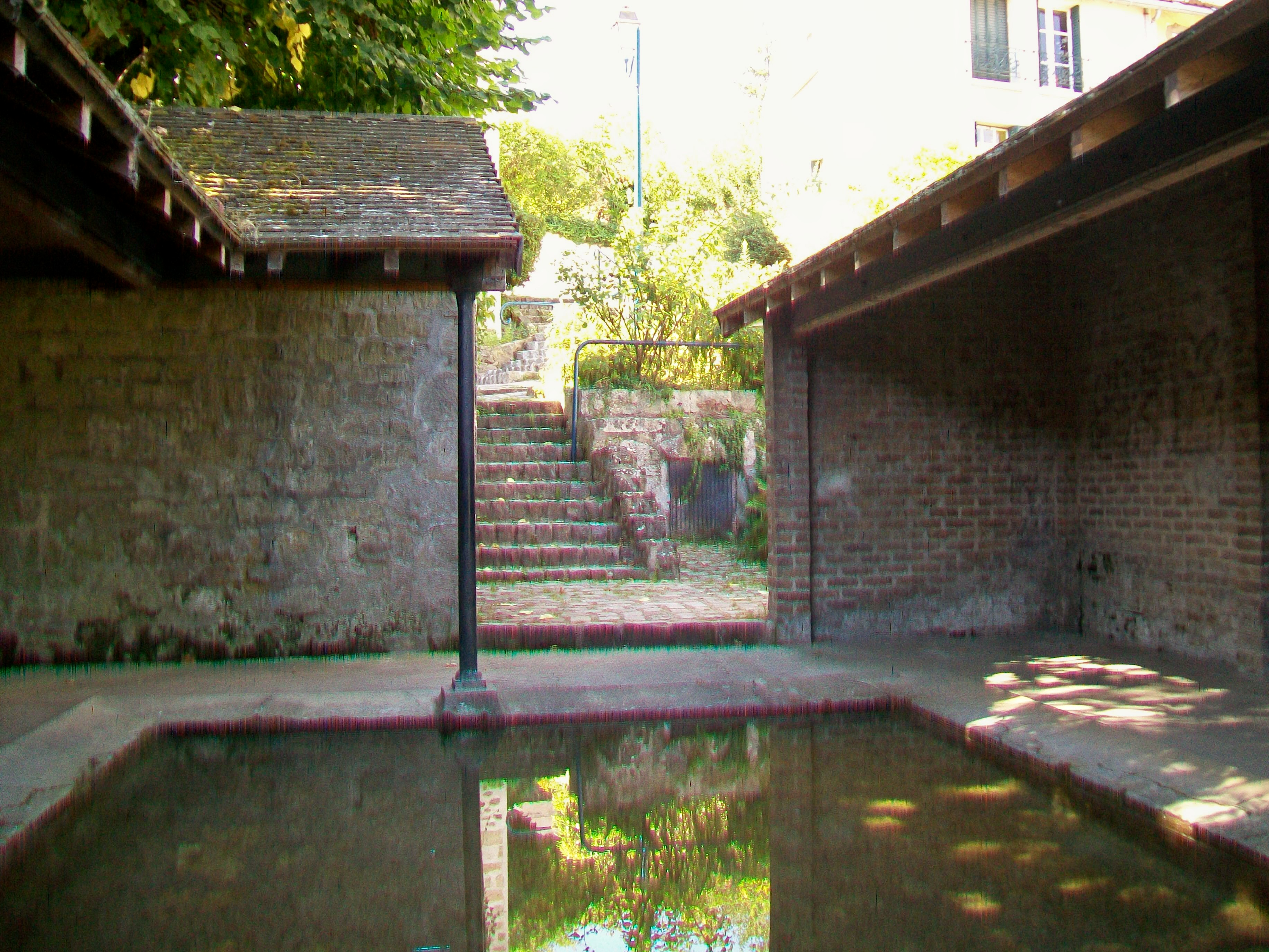 Intérieur du lavoir des Dames Gilles, rue des Dames Gilles.